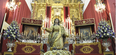 Besamanos de Ntra Sra de la Asunción